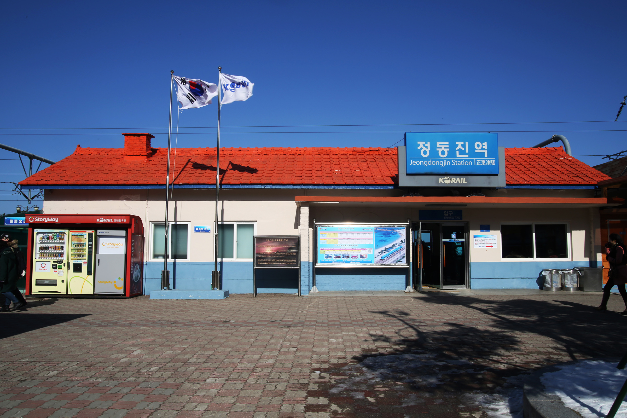 Frontview of Jeongdongjin Station in 2013